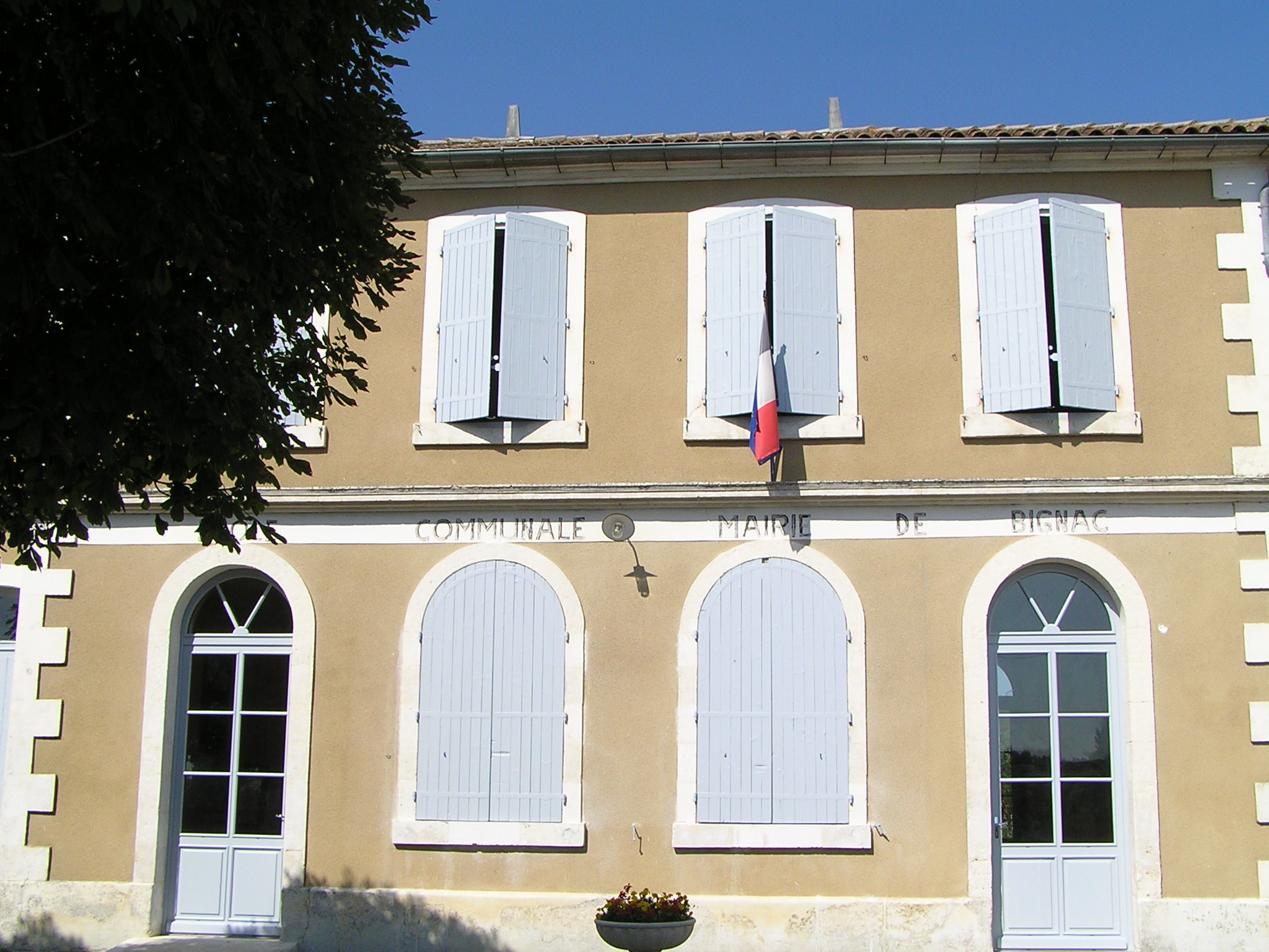 mairie de Bignac